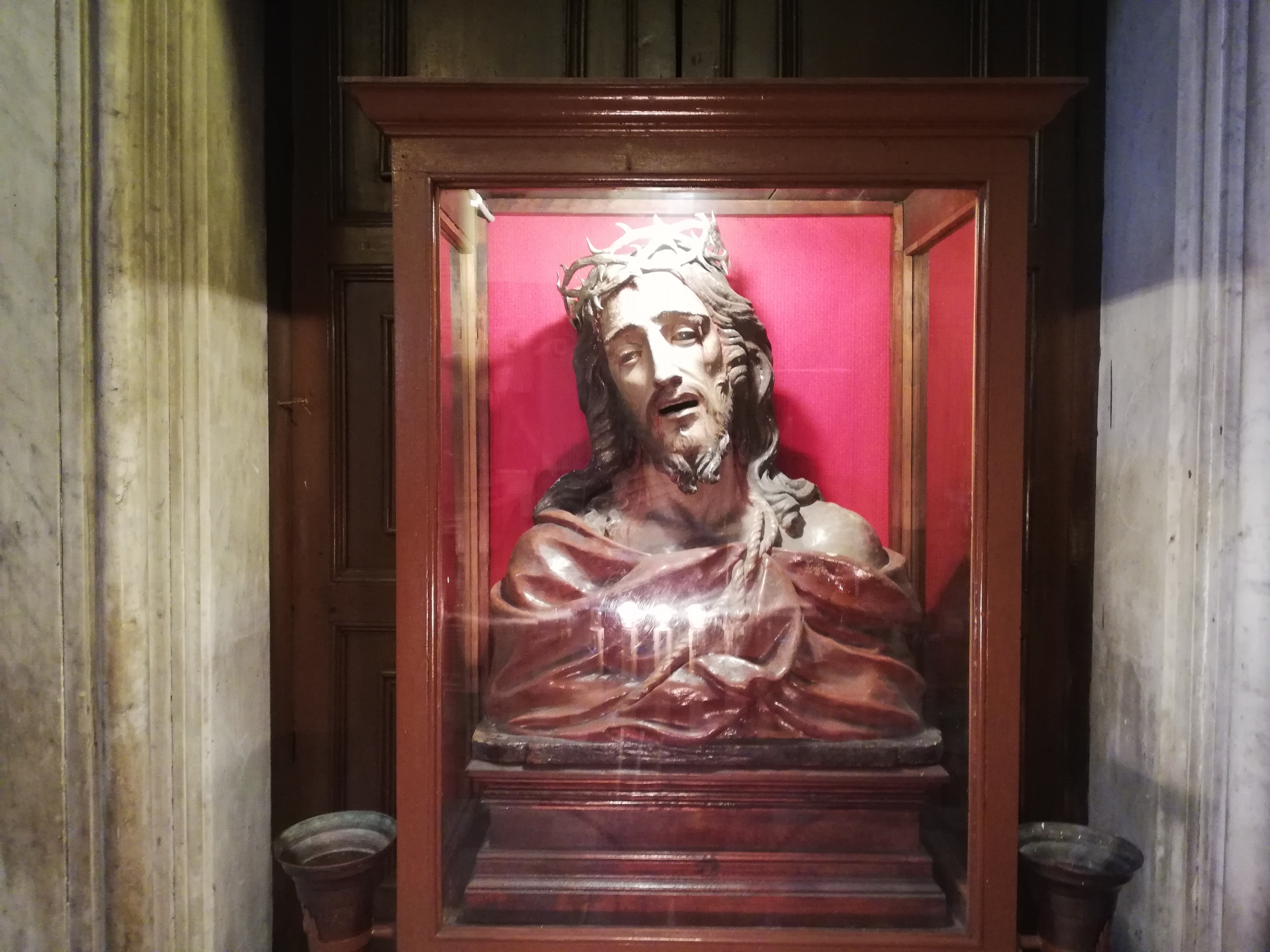 Ecce Homo, busto ligneo.